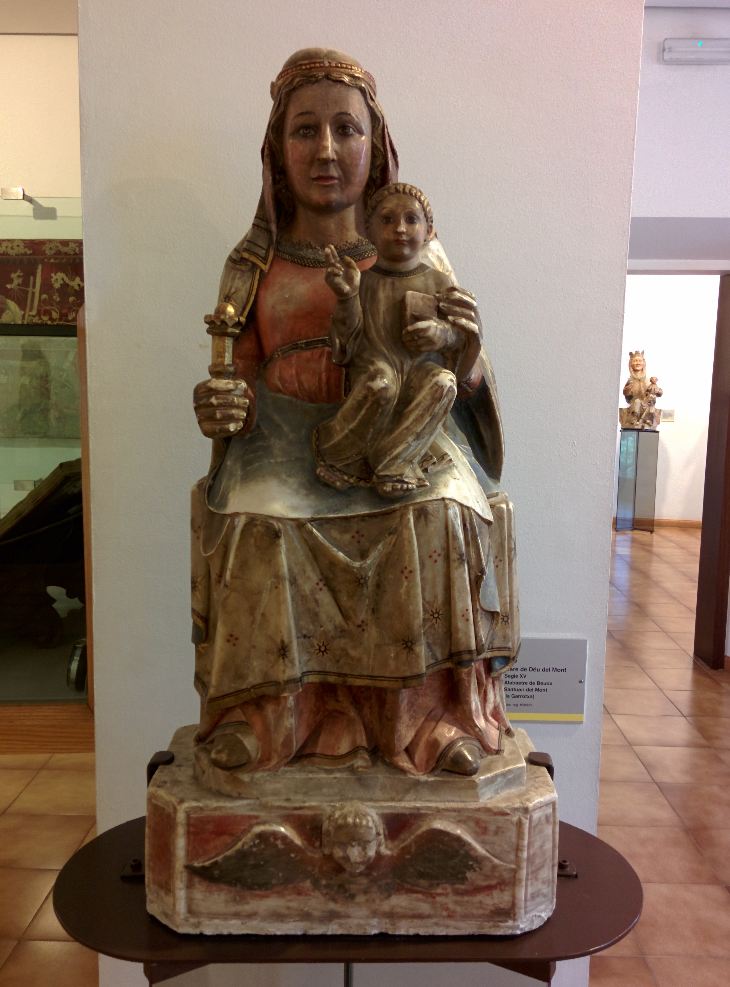 Santuari la Mare de Déu del Mont (Albanyà)